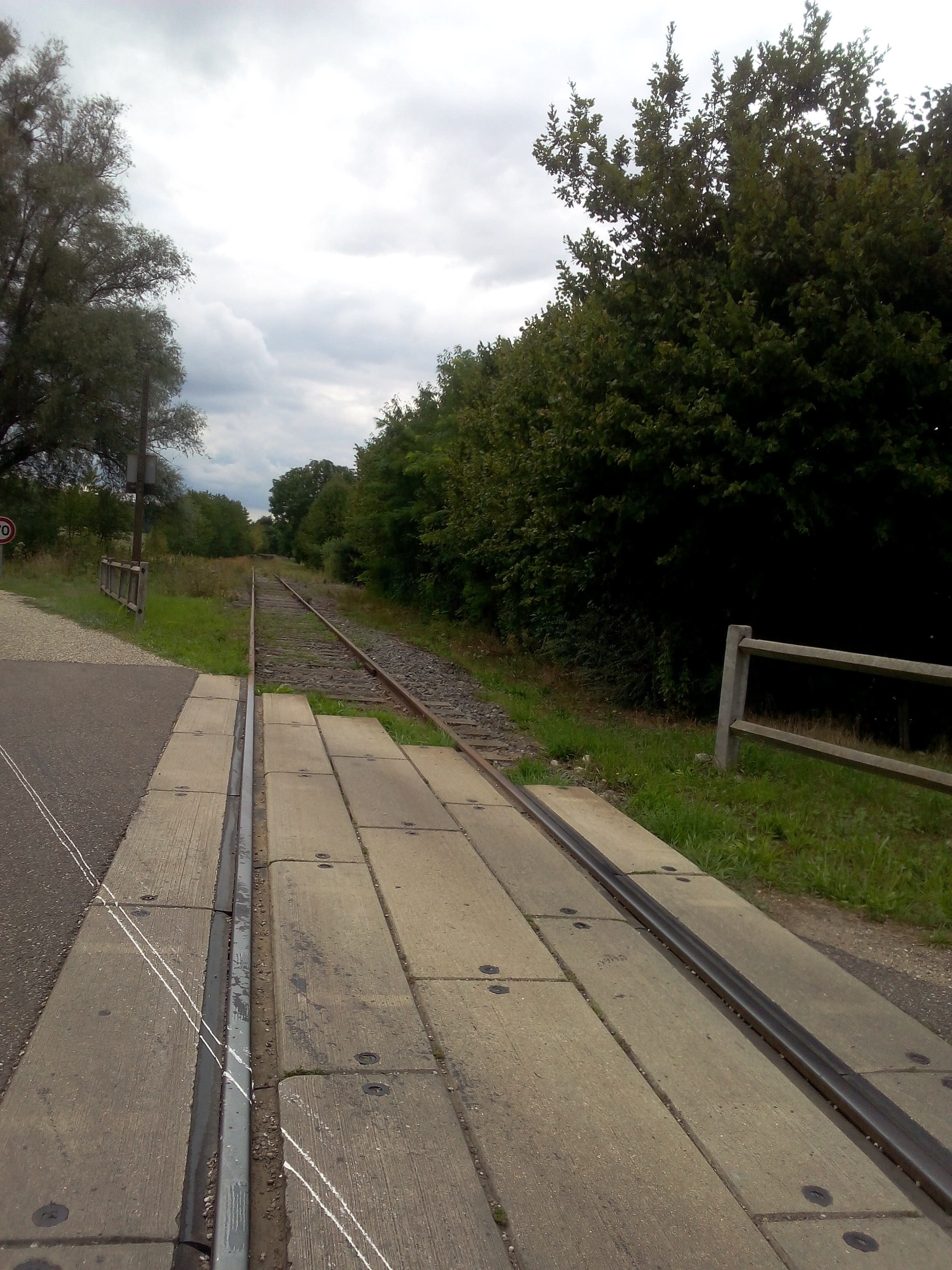 Voie ferrée abandonnée à Pfaffenhoffen.